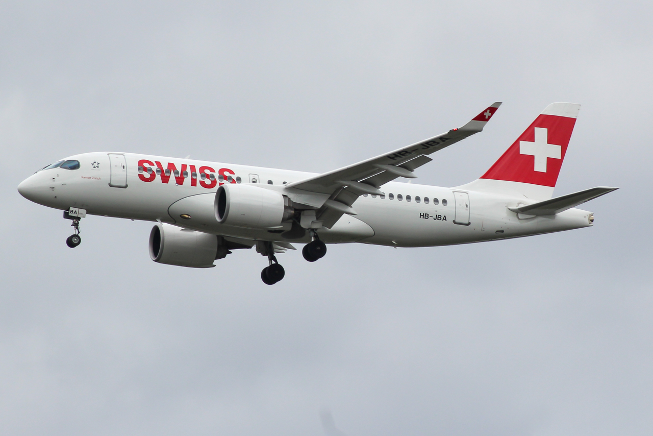 HB-JBA Bombardier CS-100 Swiss